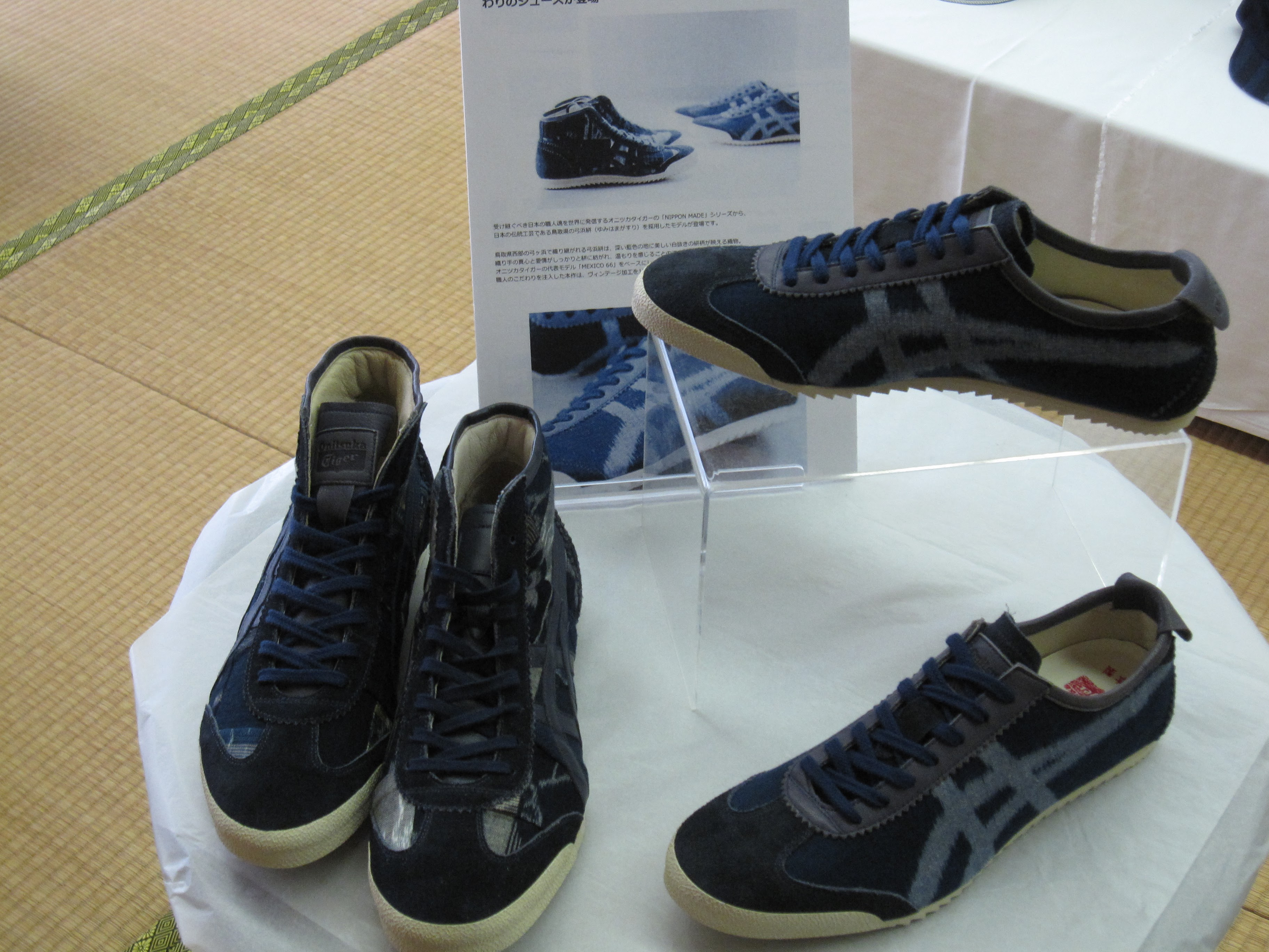 弓浜絣、アジア博物館井上靖記念館（鳥取県米子市）の特別展で撮影